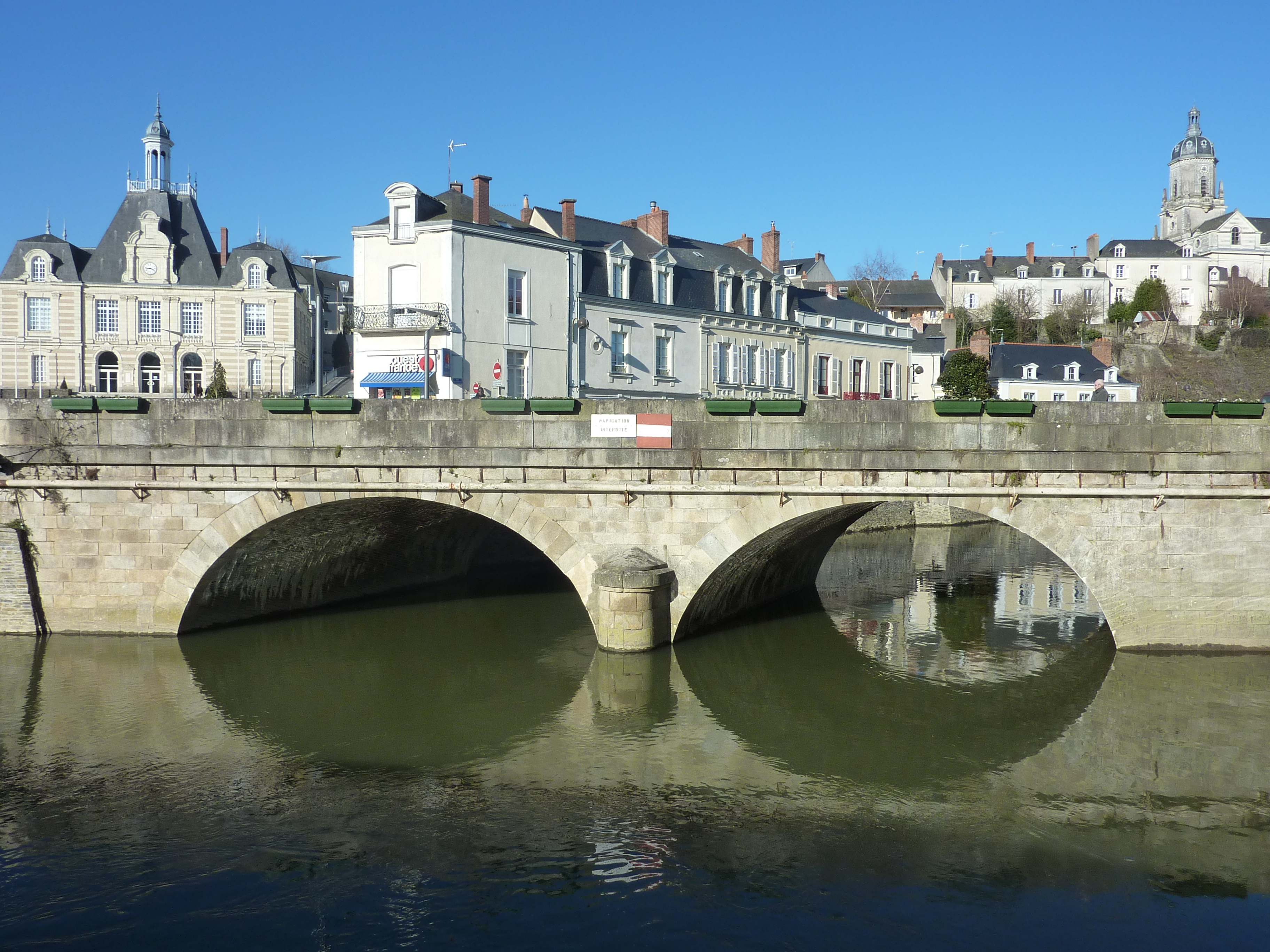 Vue d'ensemble, en arrière plan : Hôtel de Ville et Église de Sainte Madeleine